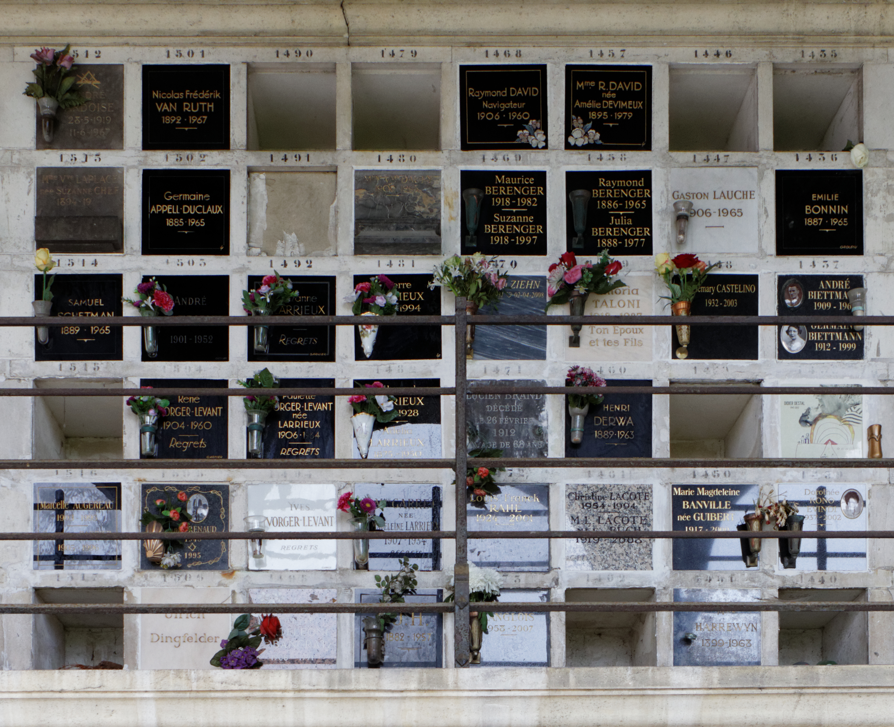 Cases du columbarium du cimetière du Père-Lachaise.